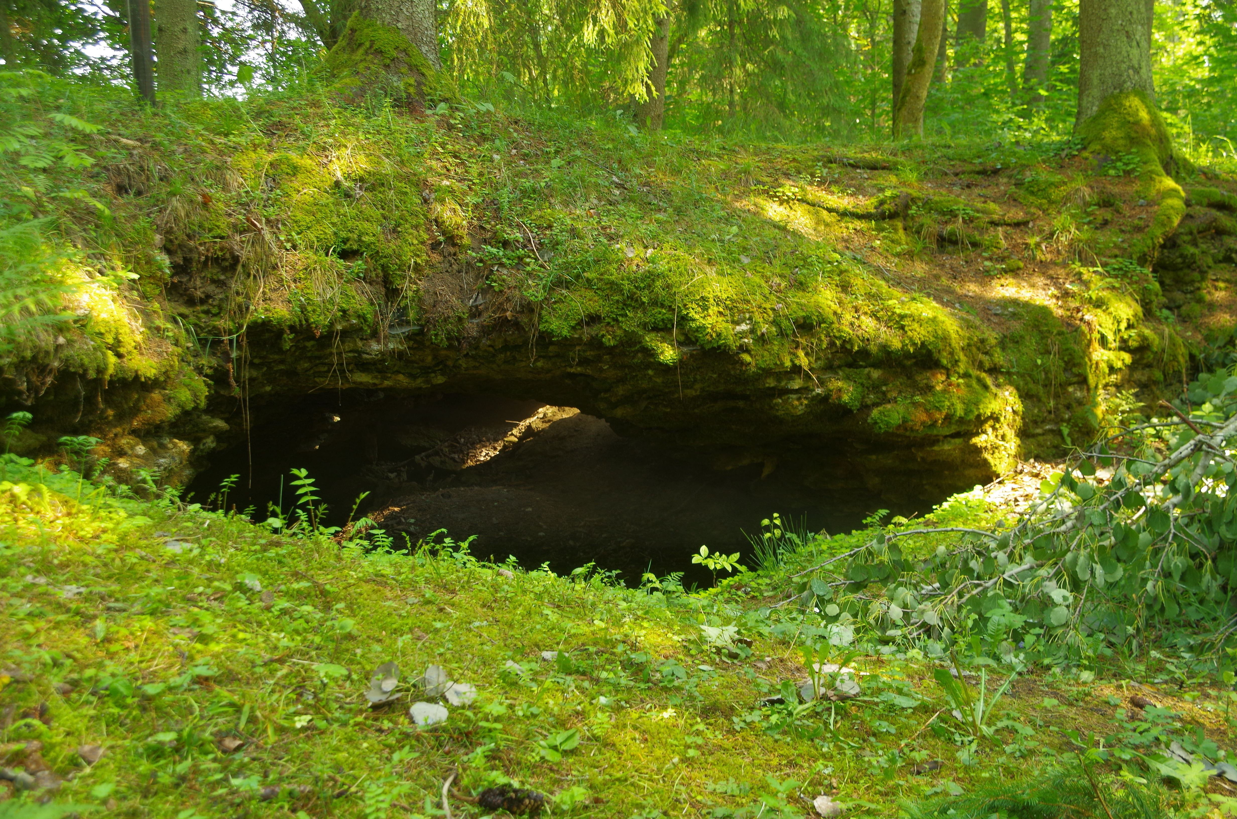 Kuimetsa karstiala kaitseala asub Raplamaal Kaiu vallas. Tuntud ka kui Iida urked. Karstiala võeti kaitse alla 1959. aatal Kuimetsa urgete nime all. Siin esineb rohkelt langatuslehtreid ja –nõgusid. Samuti koopaid, mille kõrgus ulatub kohati 2,5 ja pikkus üle 20 meetrini.